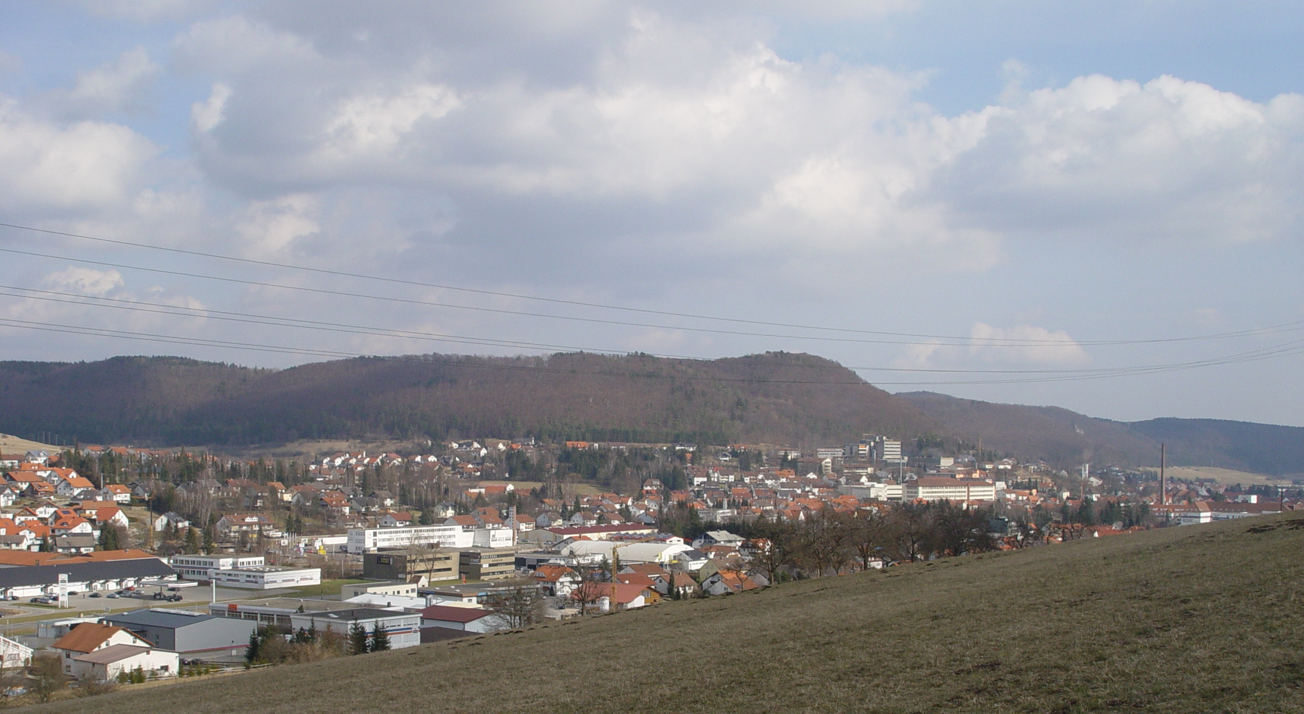 Stadt Burladingen, Deutschland